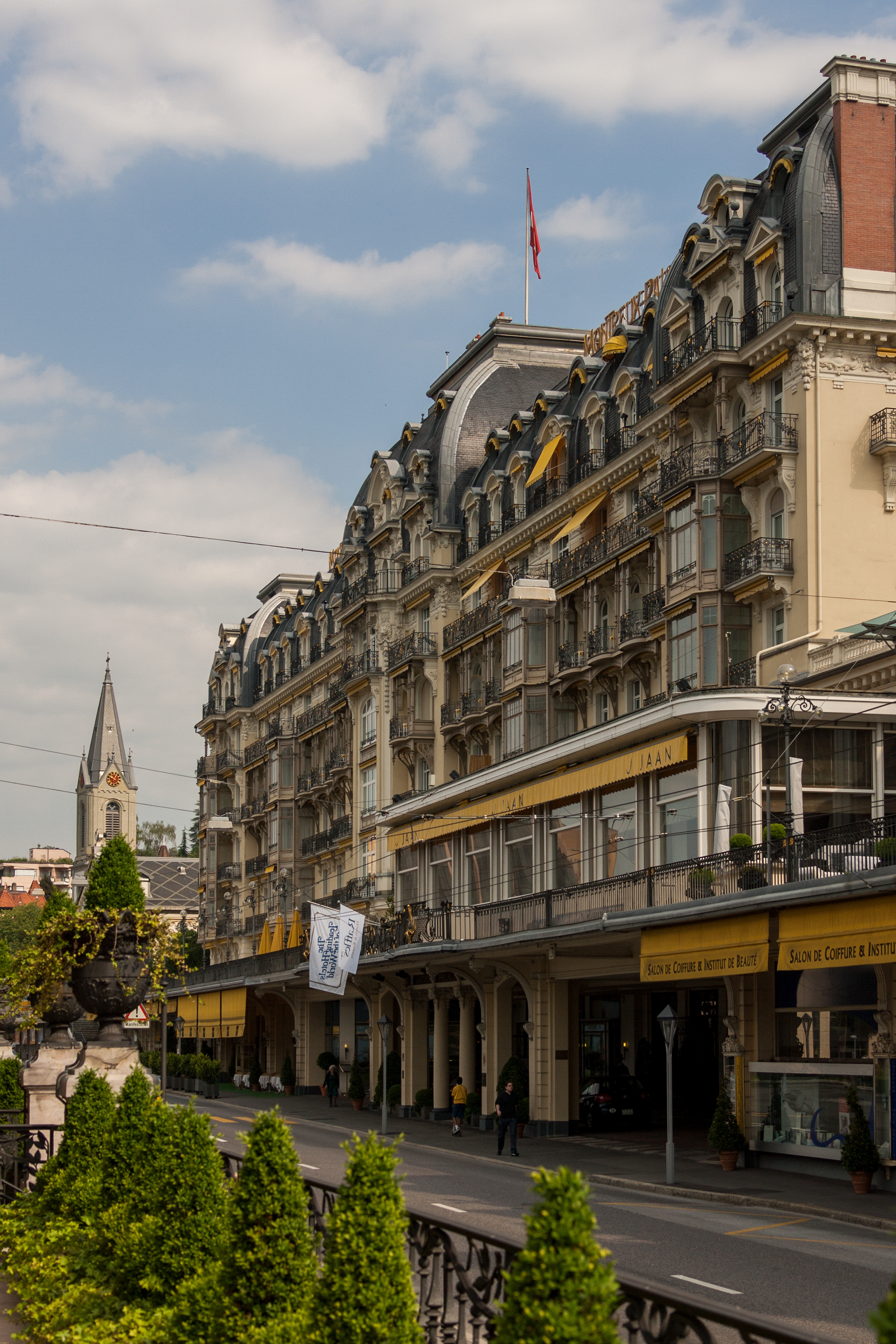 Raffles Le Montreux Palace in Montreux (VD)